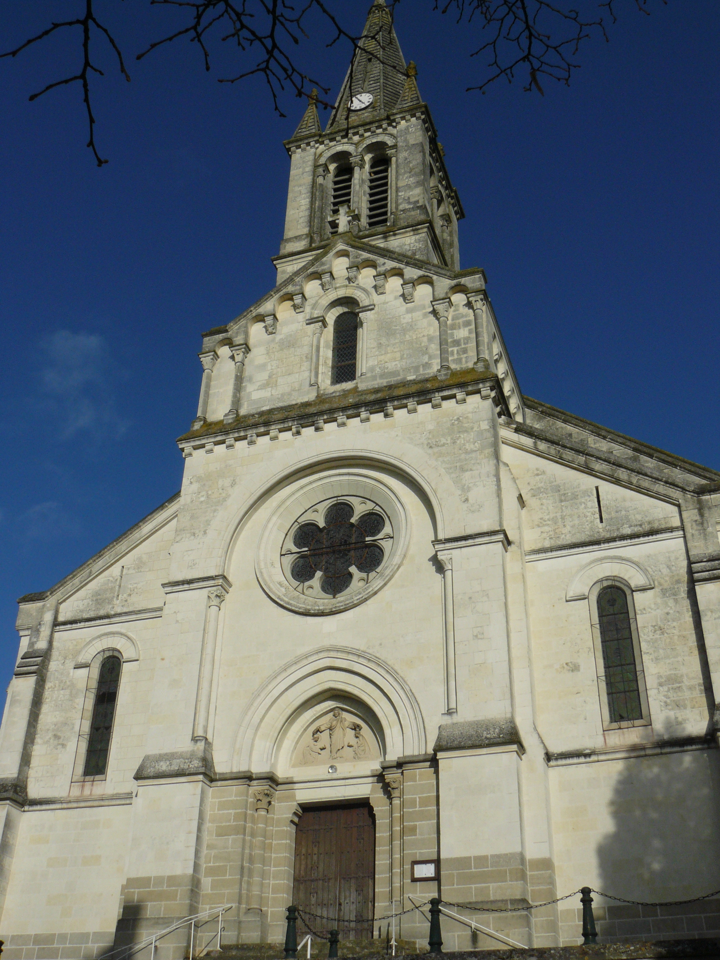 Eglise de Sainte de Maure de Touraine